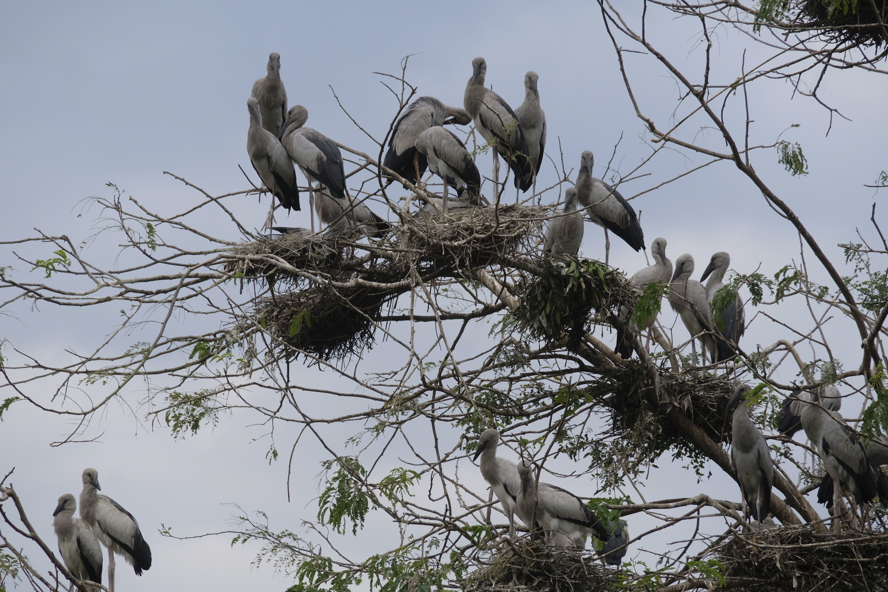 Silberklaffschnabel Kolonie in Khok Mo Buri Ram Thailand